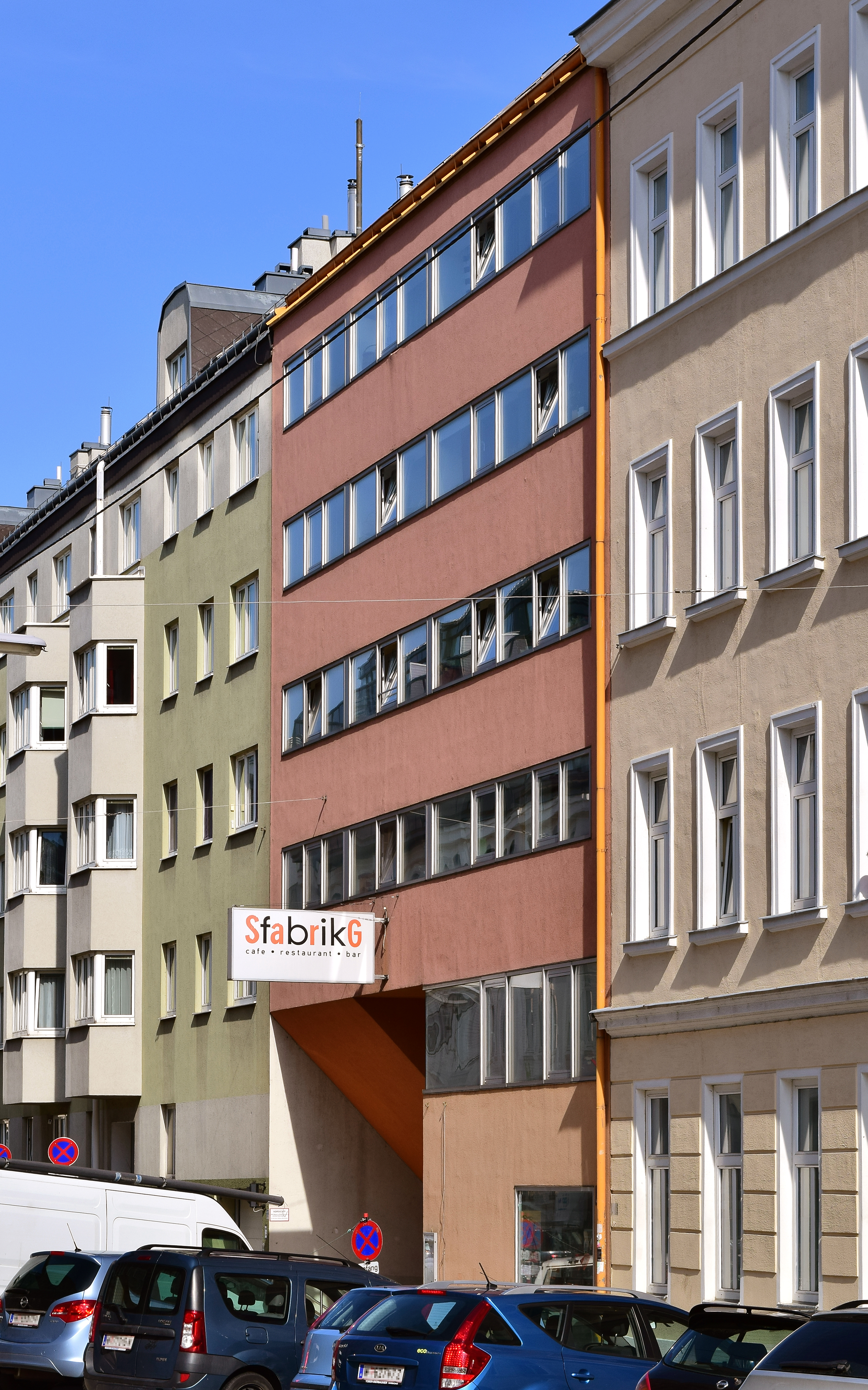 In der ehemaligen Sargfabrik in Wien-Penzing verwirklichte der Verein für Integrative Lebensgestaltung im Jahr 1996 ein Wohn- und Kulturprojekt. Darin befinden sich neben Wohnungen ein Kulturhaus, ein Badehaus, ein Seminarraum, ein Kinderhaus und ein Café-Restaurant. Näheres in diesem PDF.